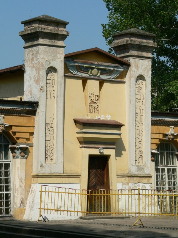 Description: classicistic "Egyptian" orangery in Końskie Opis: Klasycystyczna oranżeria egipska (zwana Egipcjanką) w Końskich. Obecnie siedziba Miejskiego Domu Kultury. Source: picture taken in June, 2005 and uploaded by Marek K. Misztal